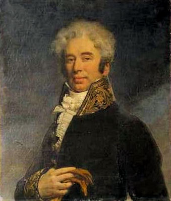 Portrait de Jules Jean-Baptiste François de Chardeboeuf de Pradel (1779-1857) par le peintre Jean-Baptiste Mauzaisse (17841844)